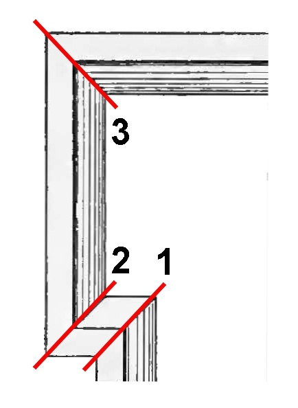 verkröpfte Rahmenecke mit den Gehrungen 1-3.